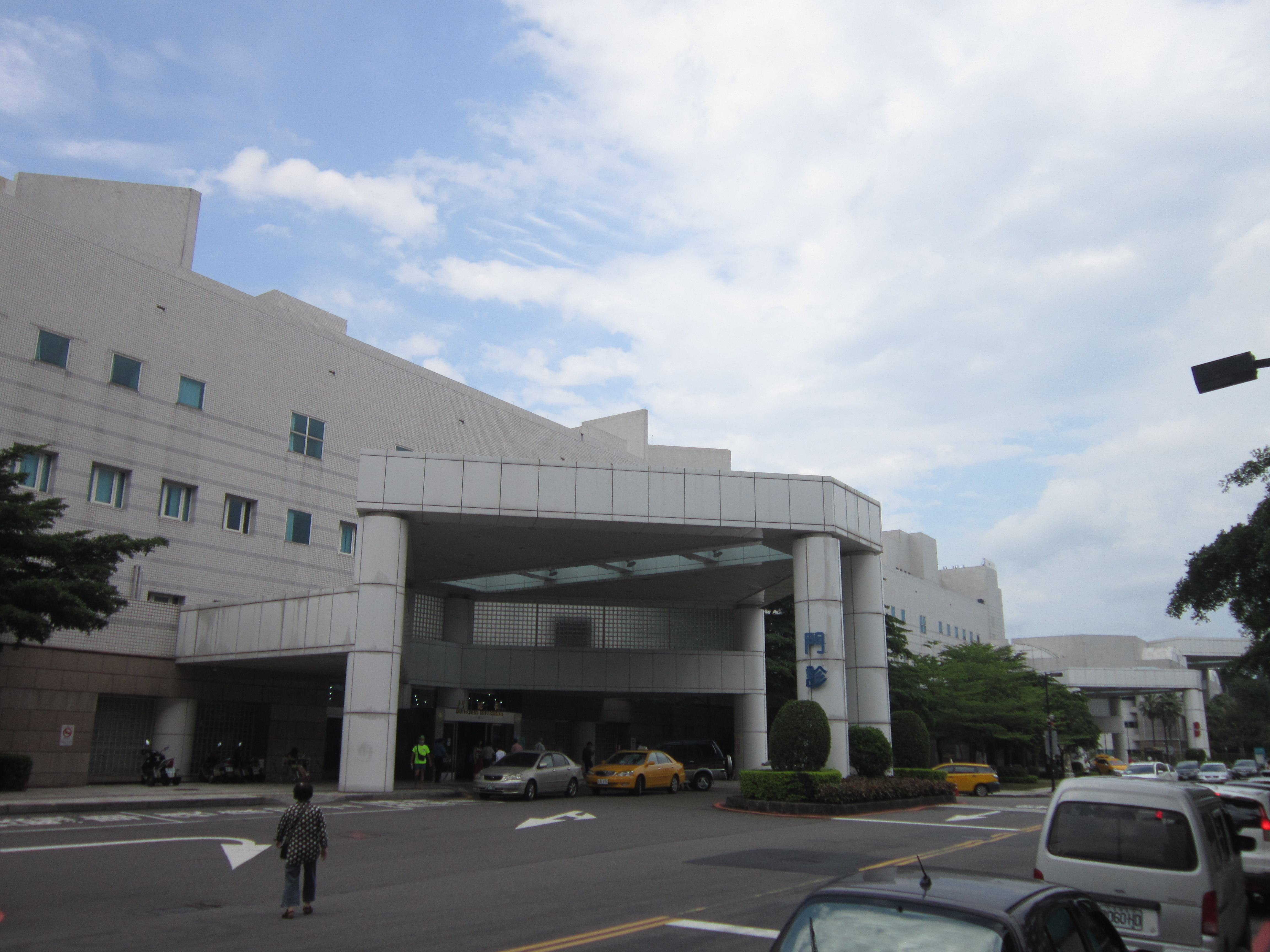 三總內湖總院區門診醫療大樓